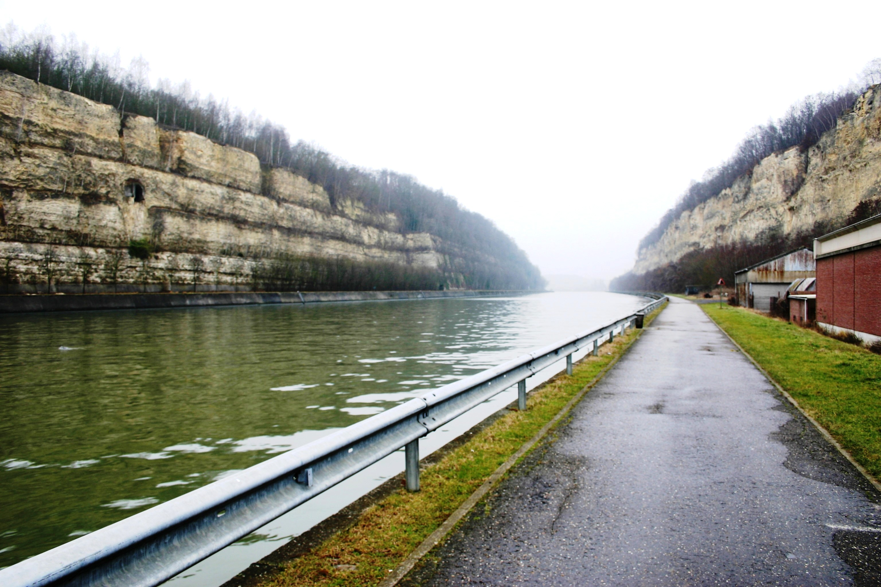 Tranchée de Caster vun der Schleis vu Lanaye a Richtung Canne gekuckt.